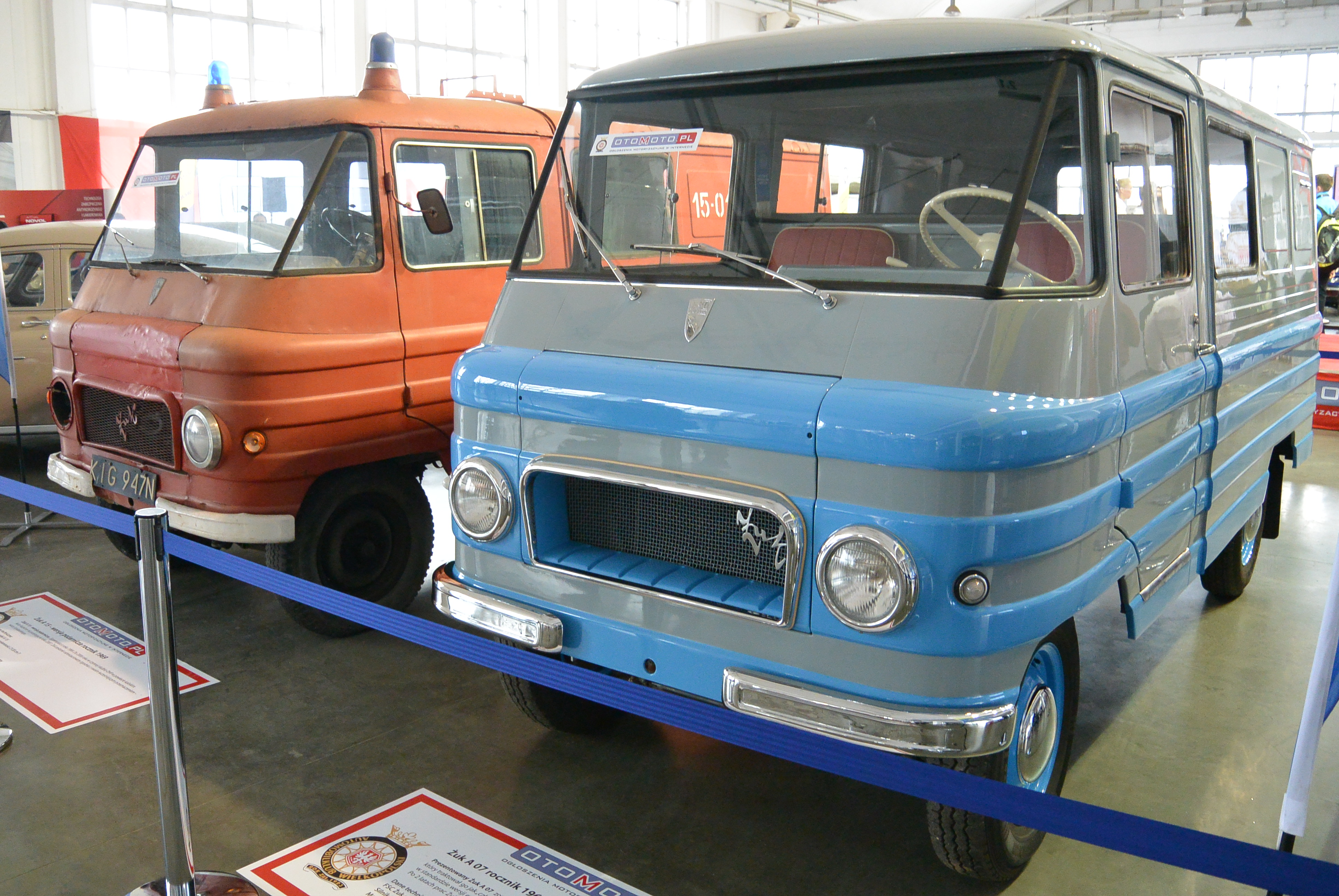 FSC Żuk A-07 rocznik 1968 podczas Motor Show Poznań 2014.